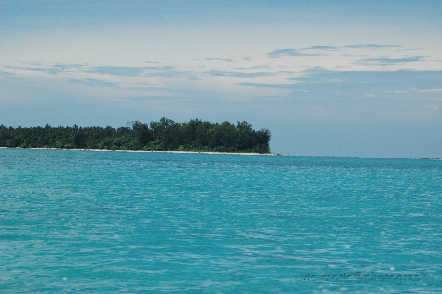 Pai Island